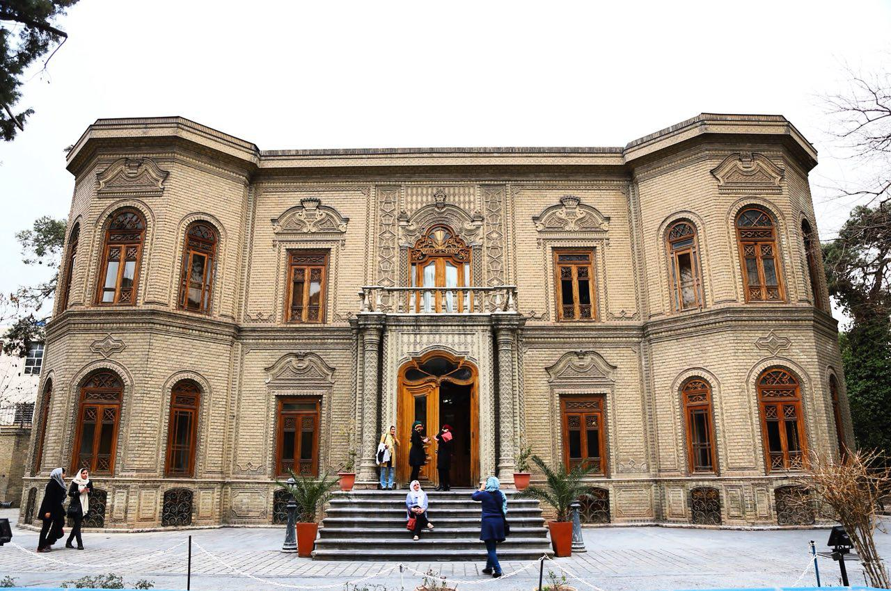 موزه آبگینه و سفالینه